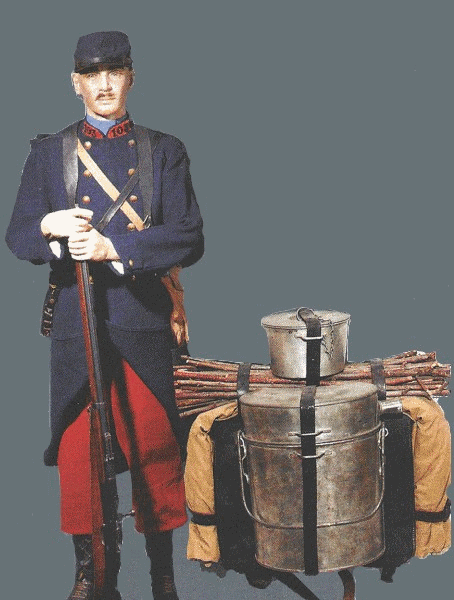 fantassin du 103 RI et son sac à dos havresac, as de carreau, modéle de 1893 et son fusil Lebel modèle 1886.